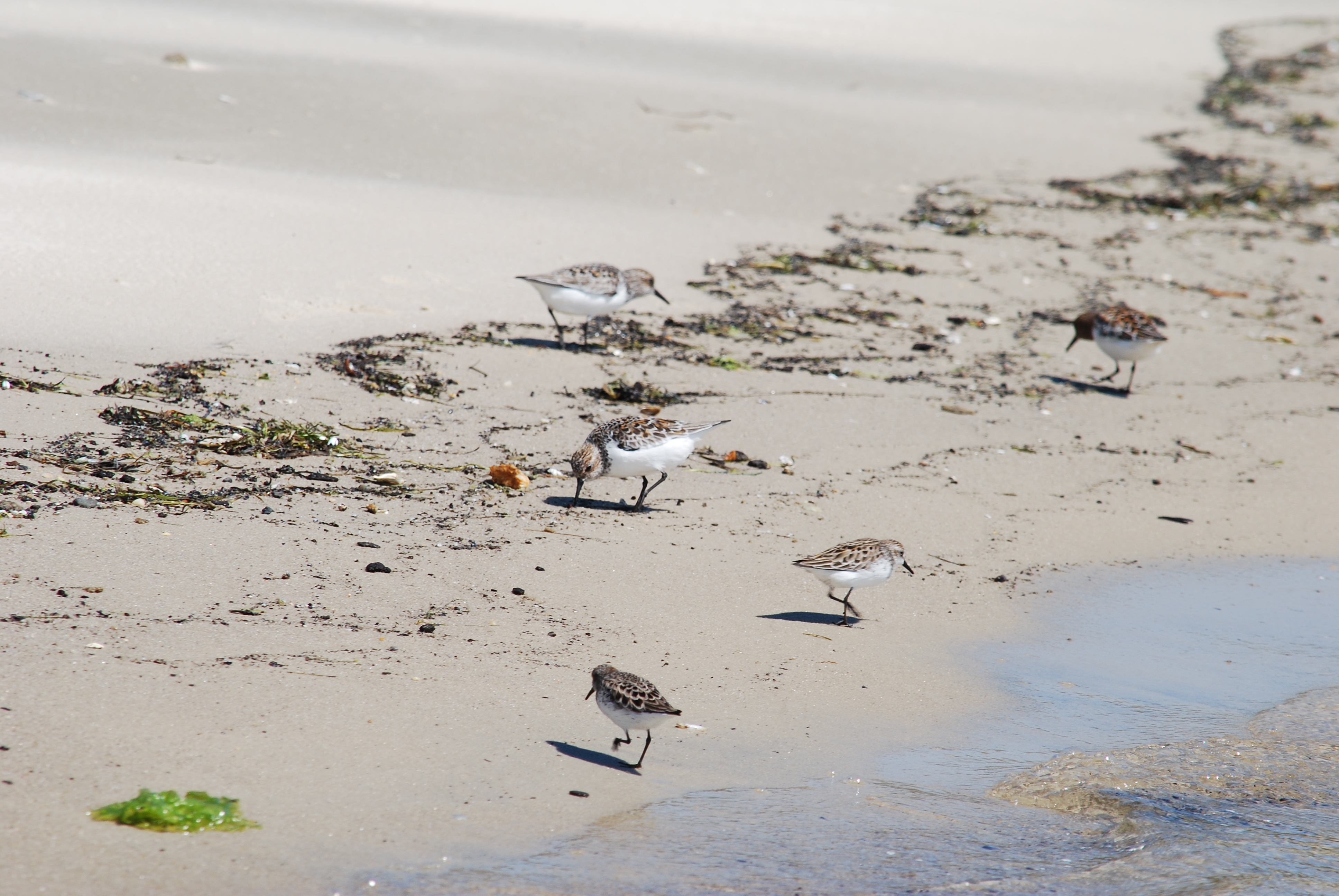 4, VA, USA